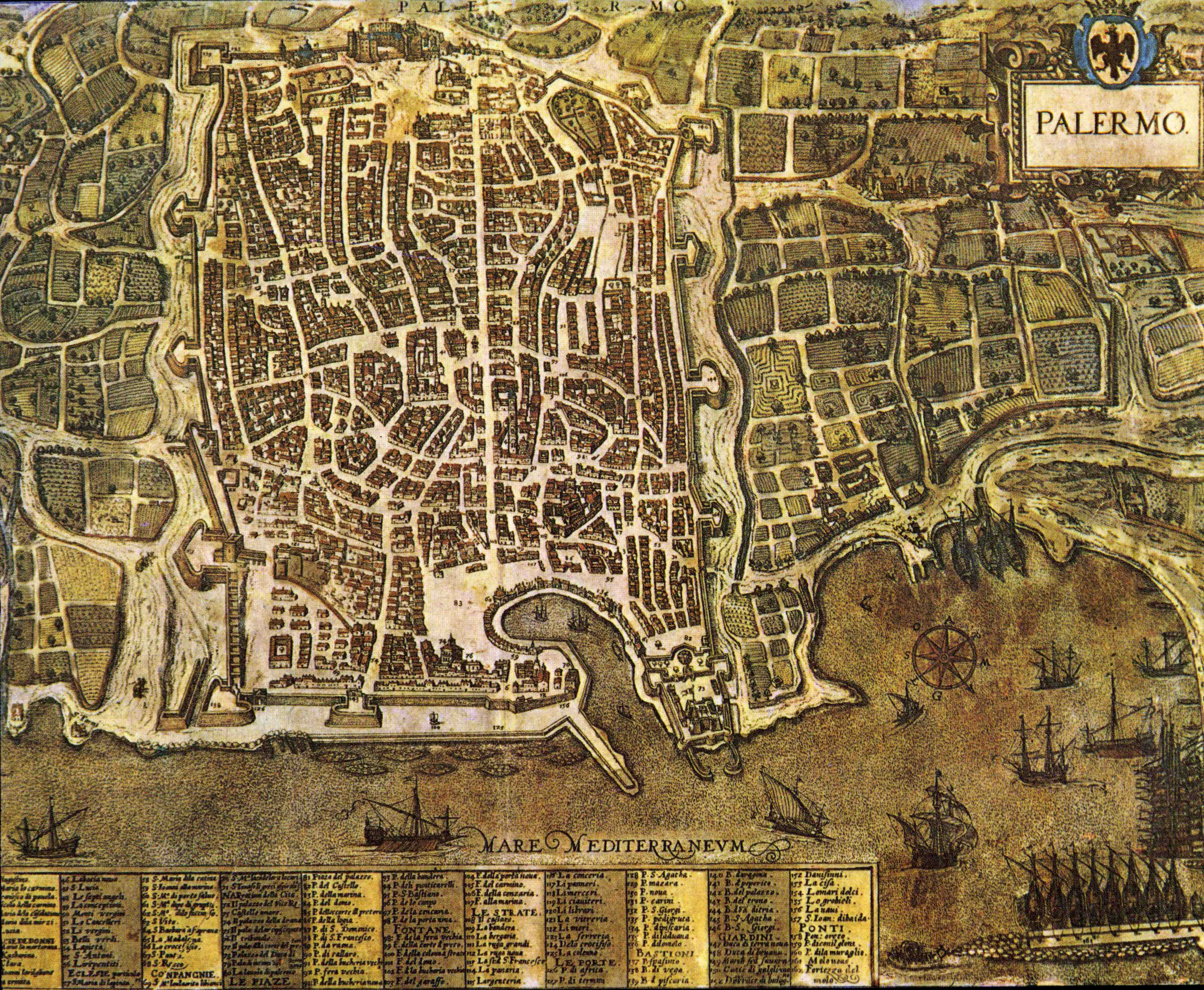 Braun Hogenberger 1581, cartolina publicamente diffusa, Palermo alla fine del '500. Licensing Pubblico dominio